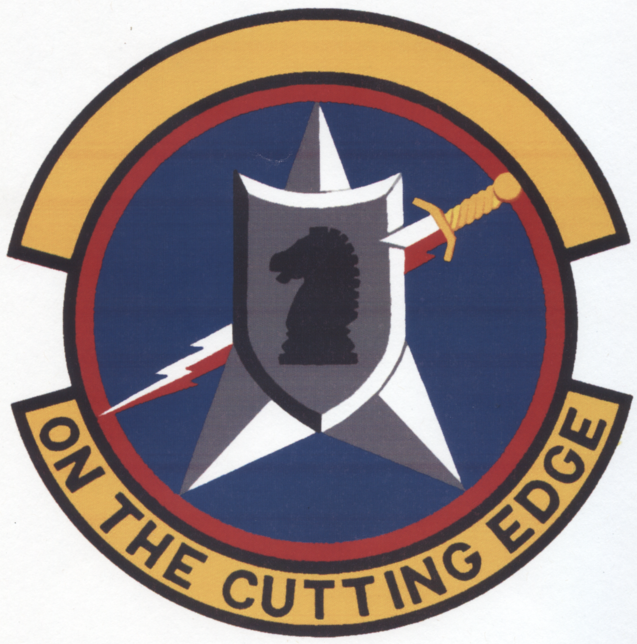 451st Intelligence Squadron emblem